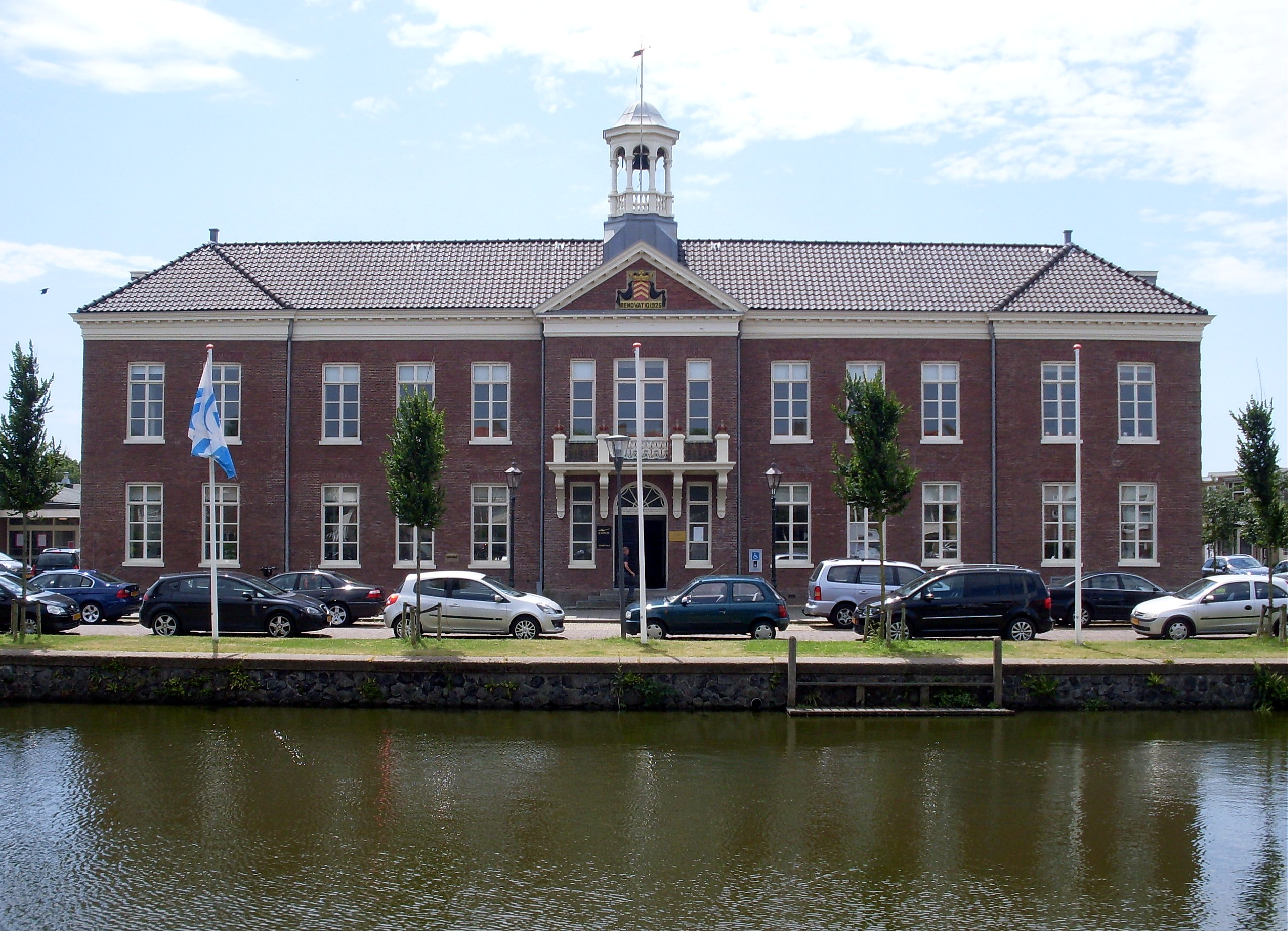 Historisch bouwwerk in Den Helder